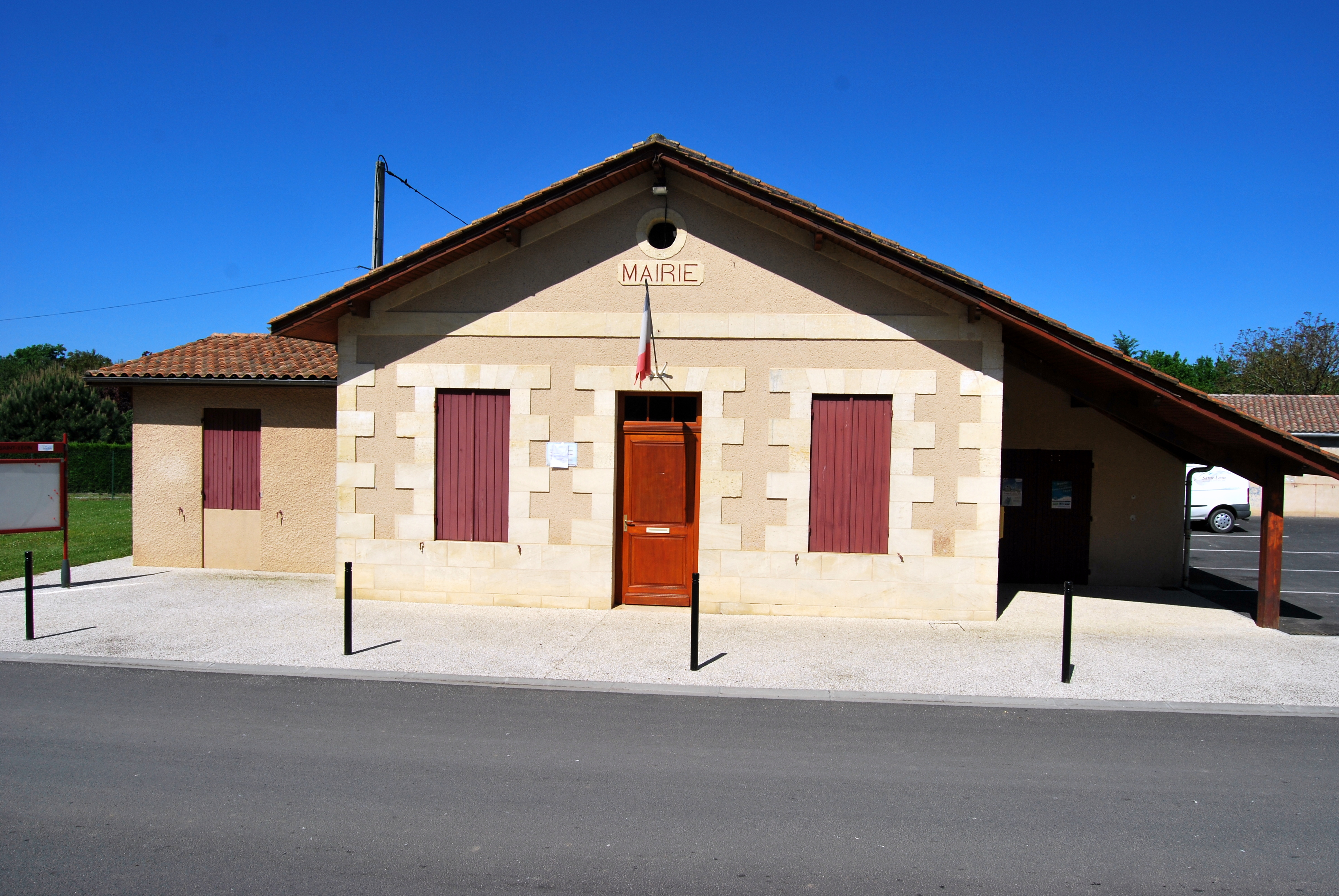 Saint-Léon Mairie